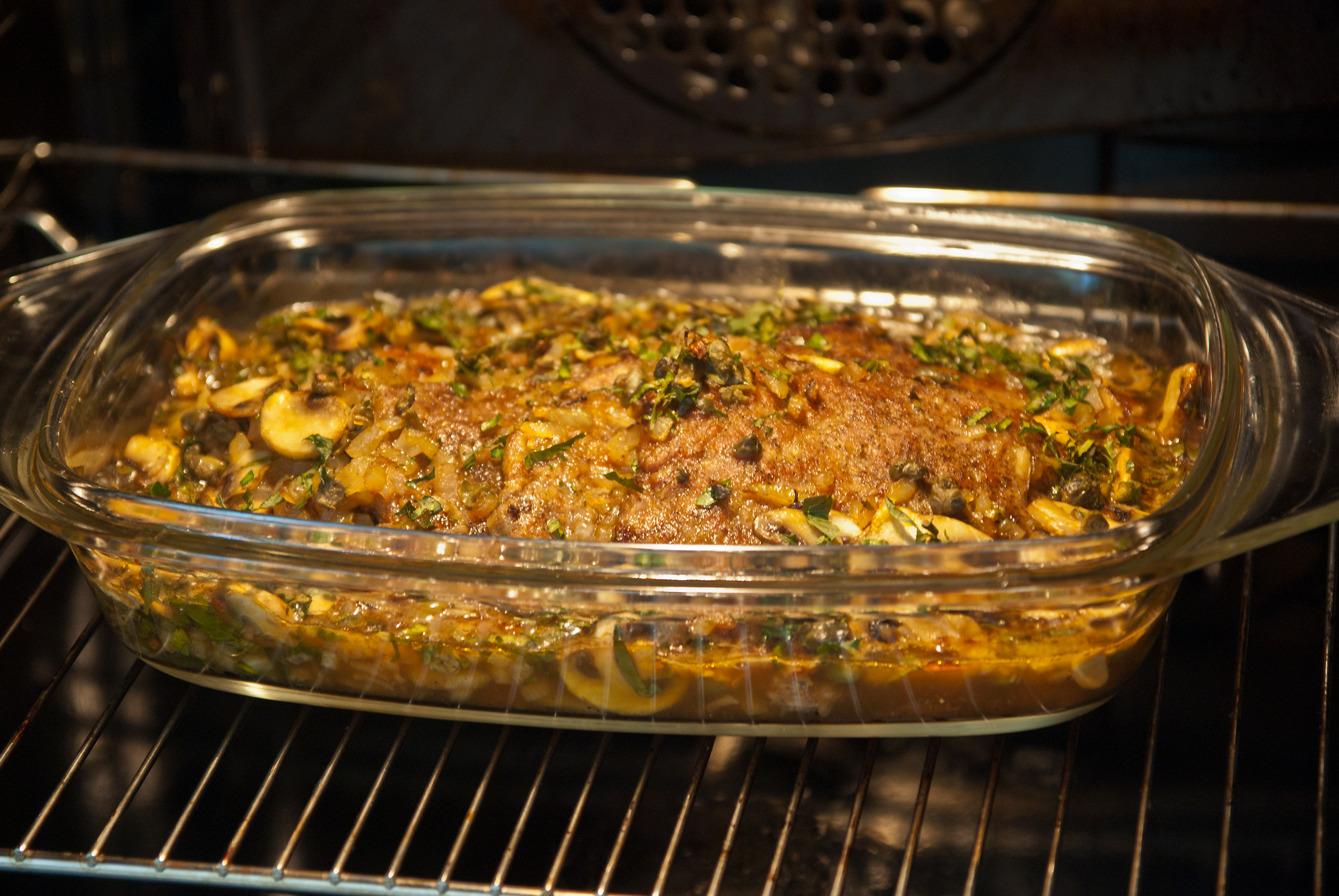 Schmoren eines Rostbratens à la Girardi im Backofen